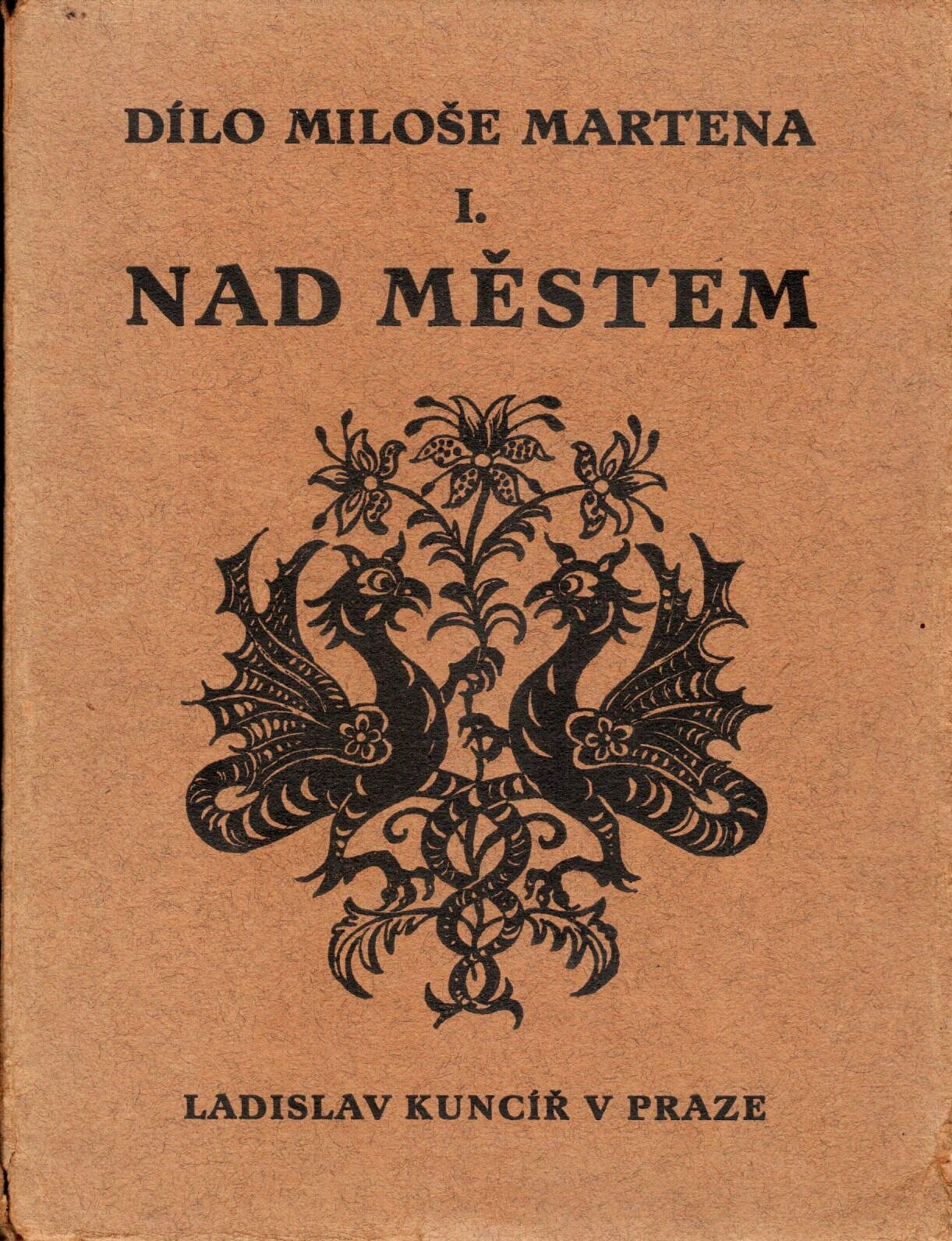 Miloš Marten: Nad městem, titulní strana 3. vydání v rámci edice "Dílo Miloše Martena", svazek 1. Ladislav Kuncíř, Praha 1924. Grafická úprava a ilustrace: Zdenka Braunerová